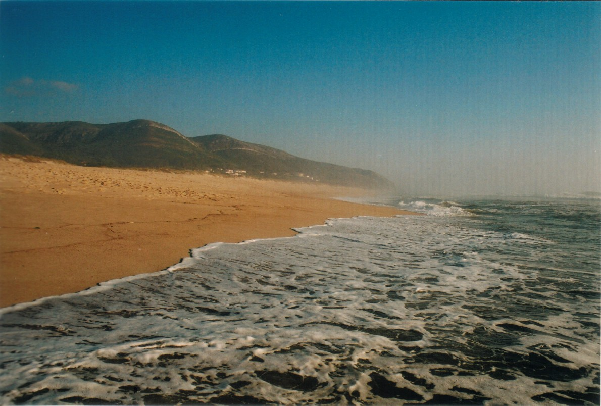 Praia de Quiaios, Figueira da Foz - Portugal.